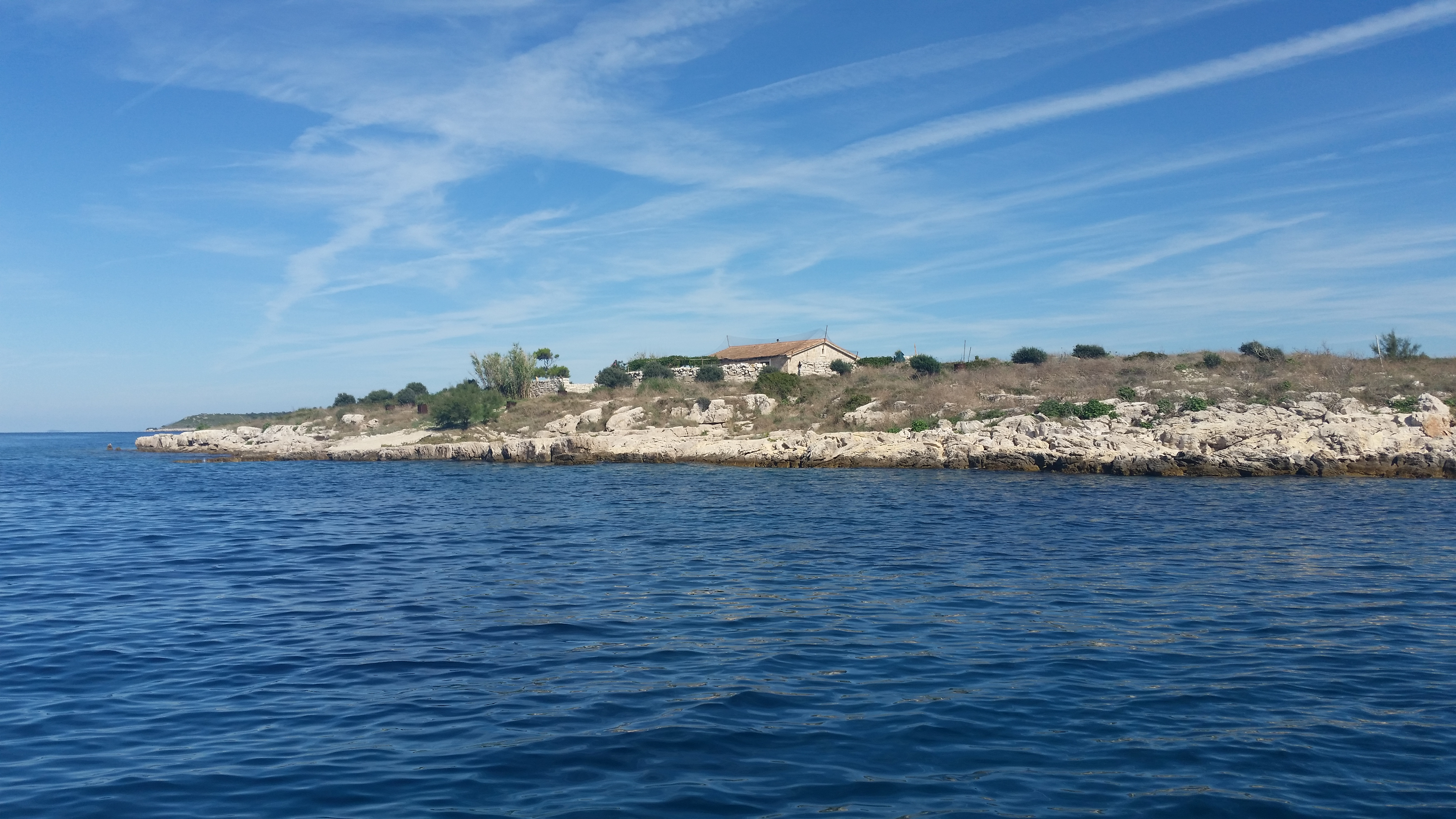 Croatia, Kornati, Otočić Ravna Sika Otočić Ravna Sika